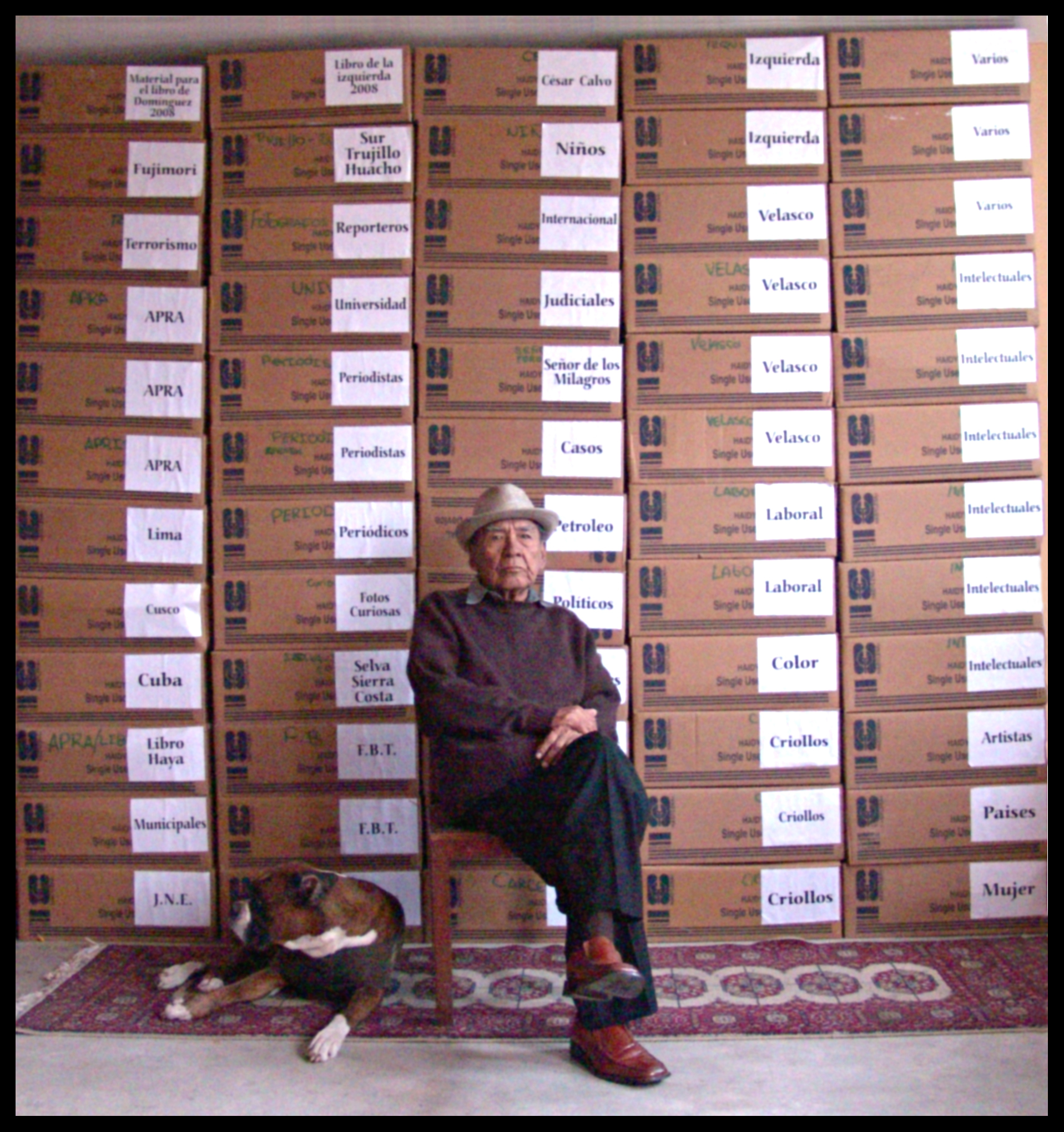 Foto tomada por su nieto Carlos R. Chung Domínguez, en Lima.